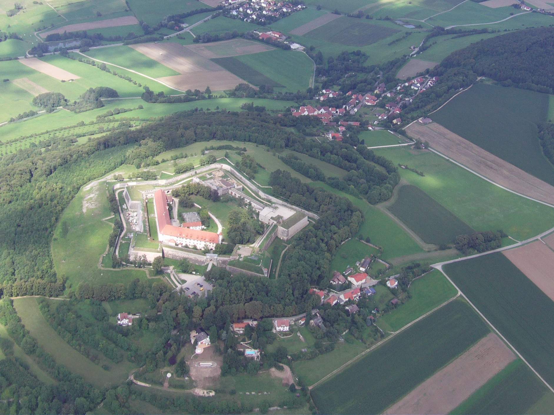 Luftbild Wuelzburg